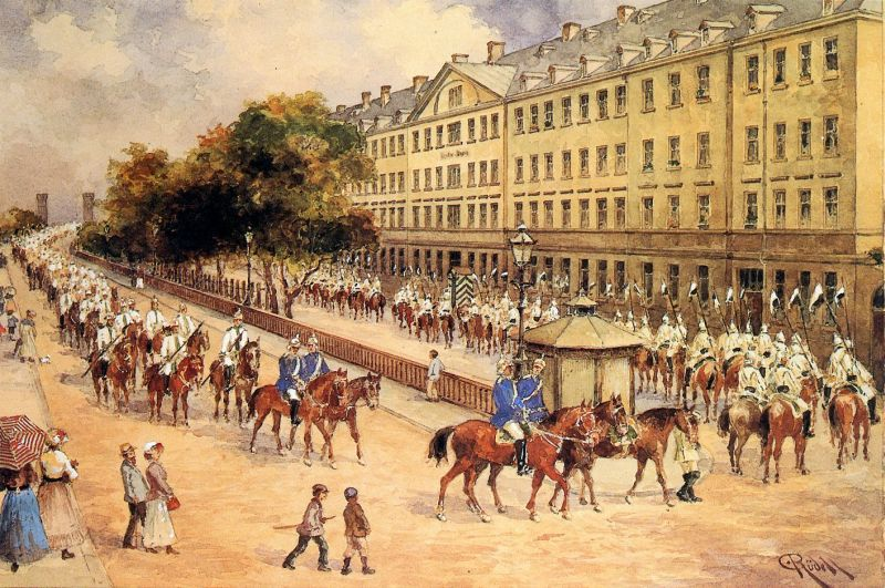 Deutzer Kürassiere um 1900; Aquarell von Carl Rüdell, 1930.